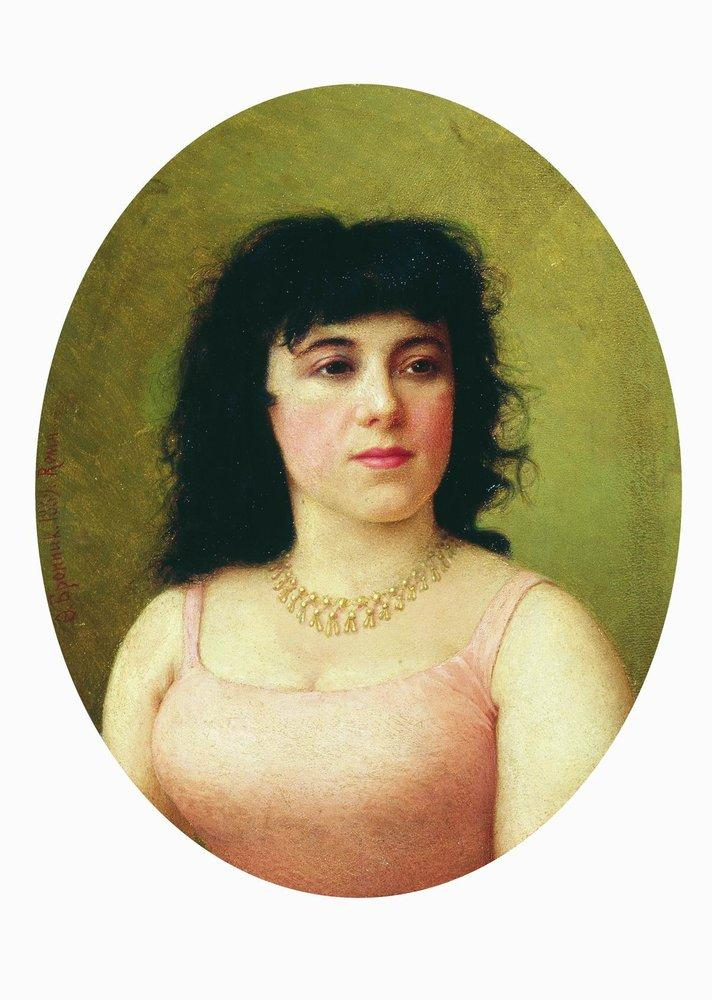 Портрет итальянской балерины Вирджинии Цукки. 1889 Virginia Zucchi